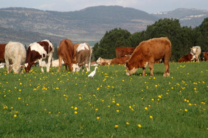 פרות במרעה בגבעות ליד חנתון